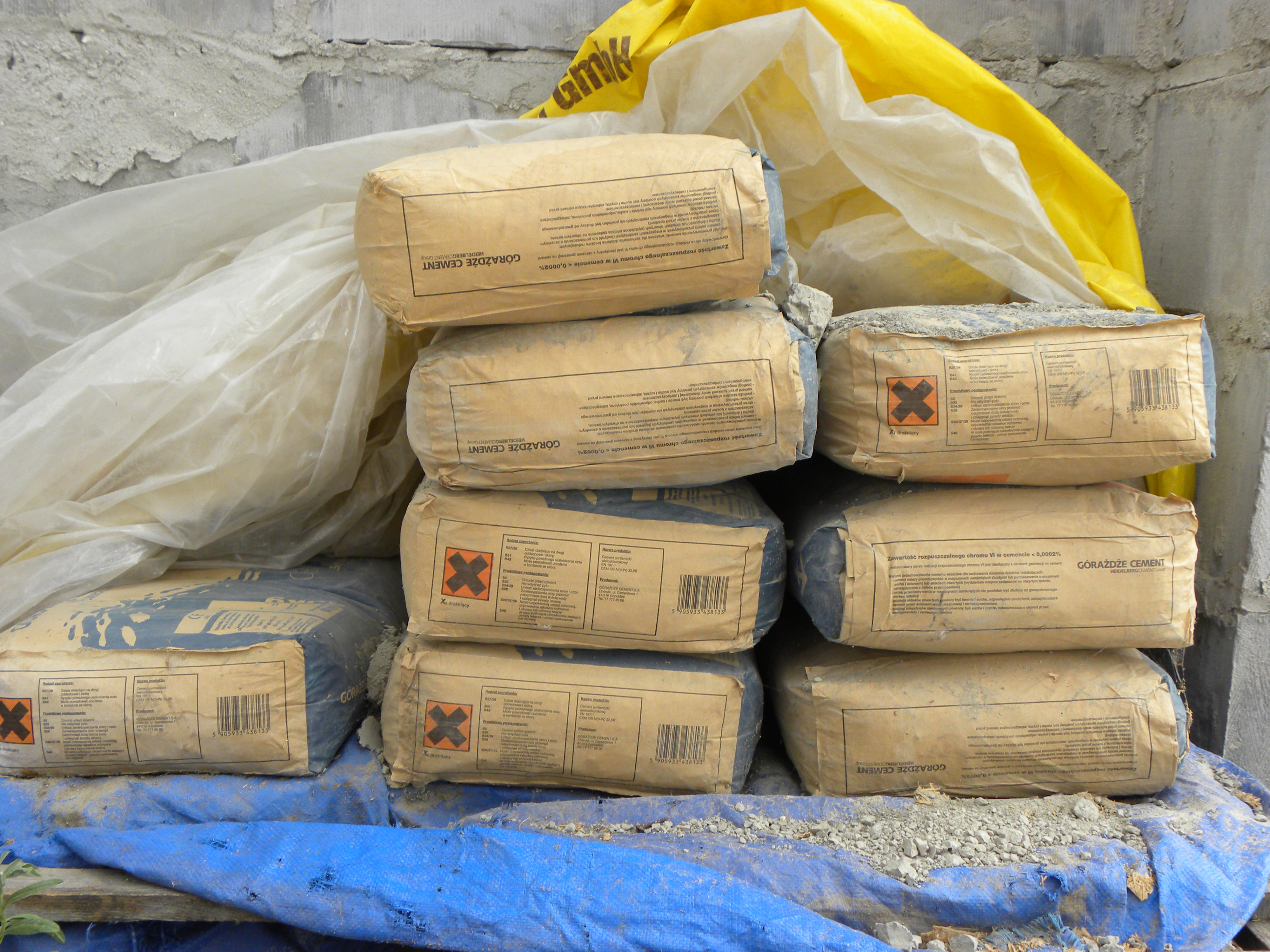 Worki z cementem English | Polski | +/−